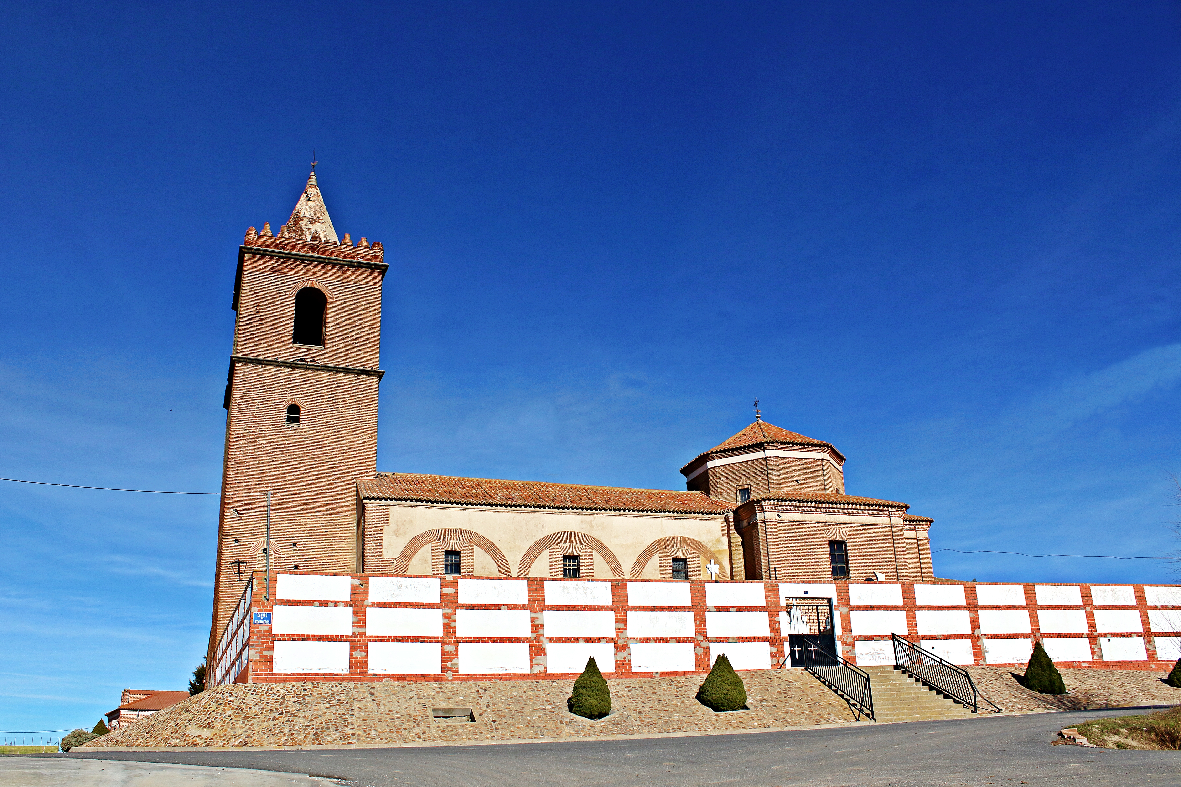 Cisla municipio de la comarca de La Moraña en la provincia de Ávila